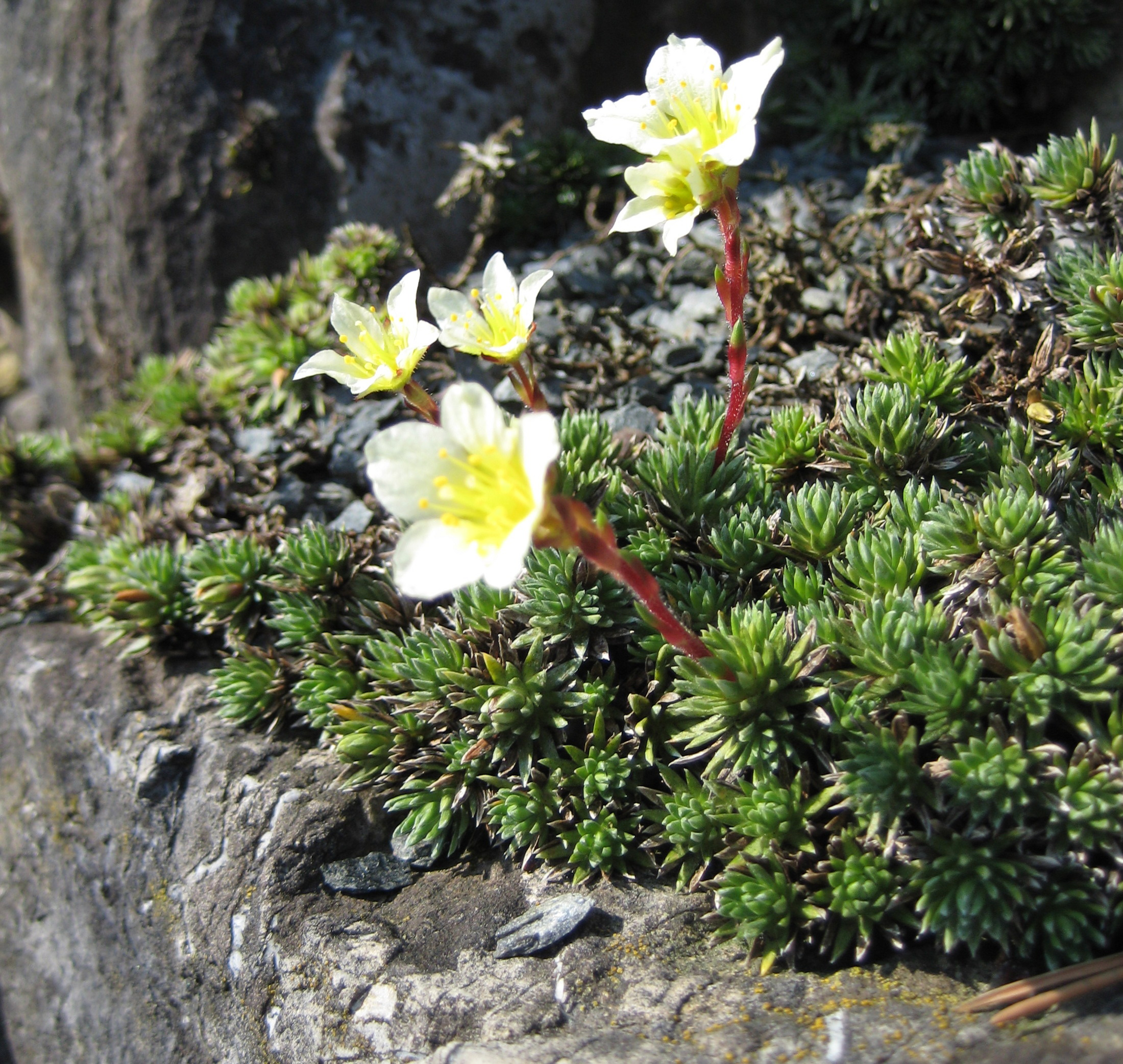 Saxifraga burseriana im Botanischen Garten Dresden